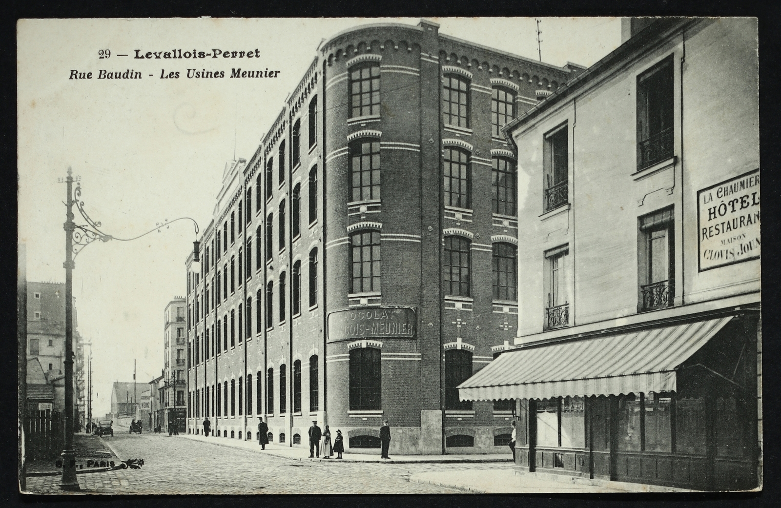 Levallois-Perret. Rue Baudin, ancienne usine Delage devenue usine des chocolats Meunier.